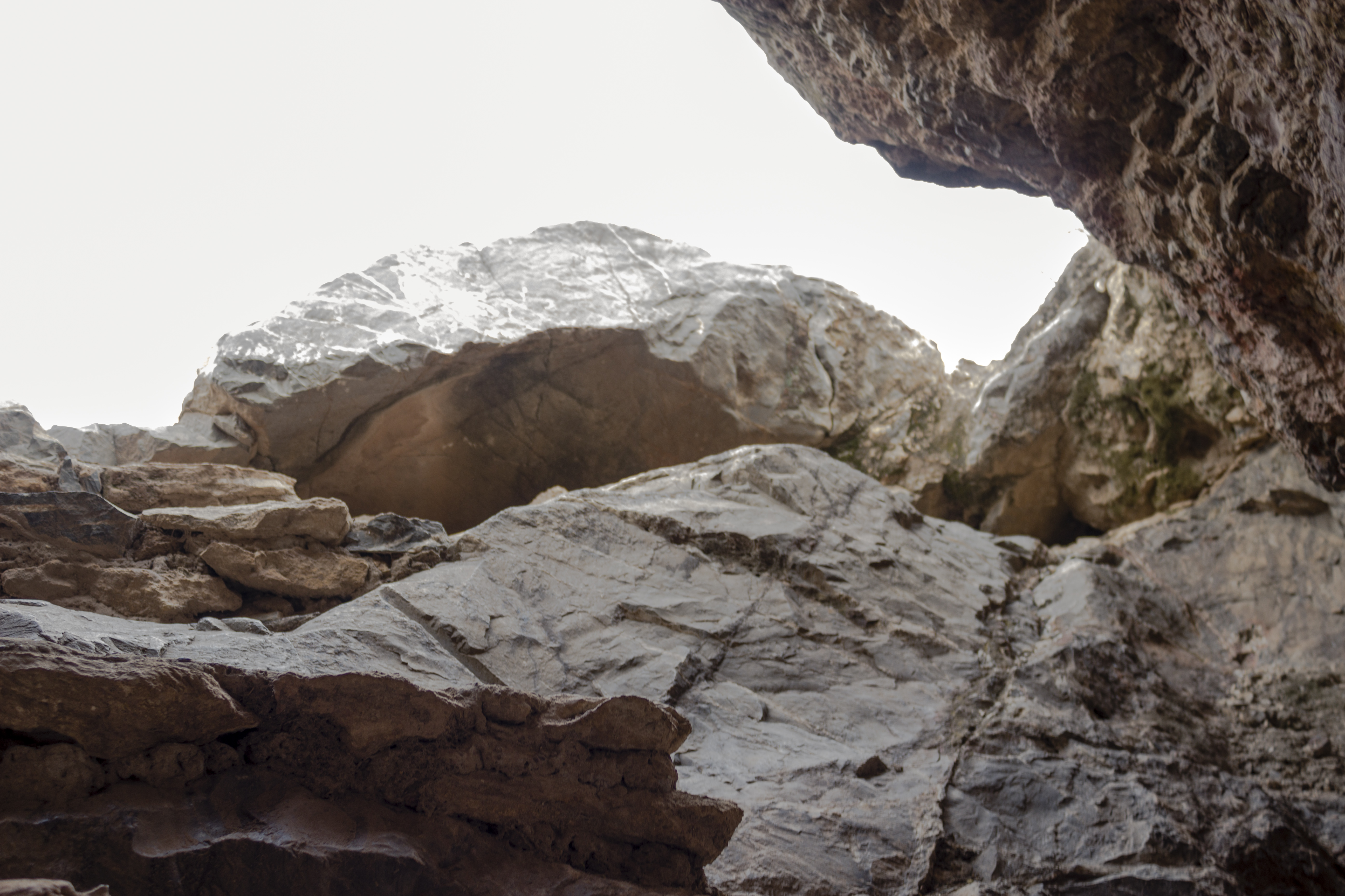 Salida de uno de los túneles que se encuentran en la mina de Santa Rita en Ojuela. Mapimí, Durango, México.